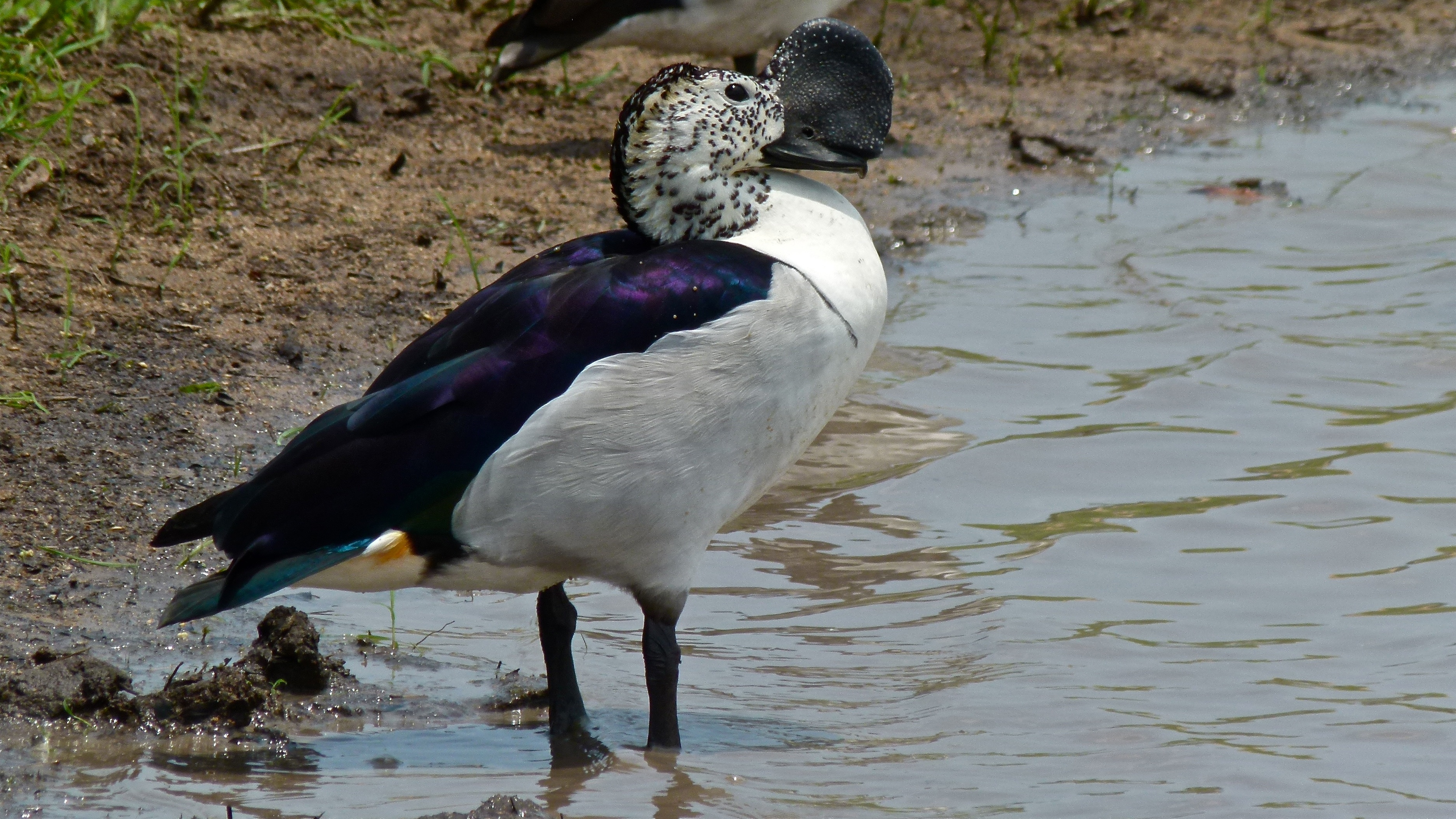 S36 Tinhongana Water Hole, Kruger NP, SOUTH AFRICA